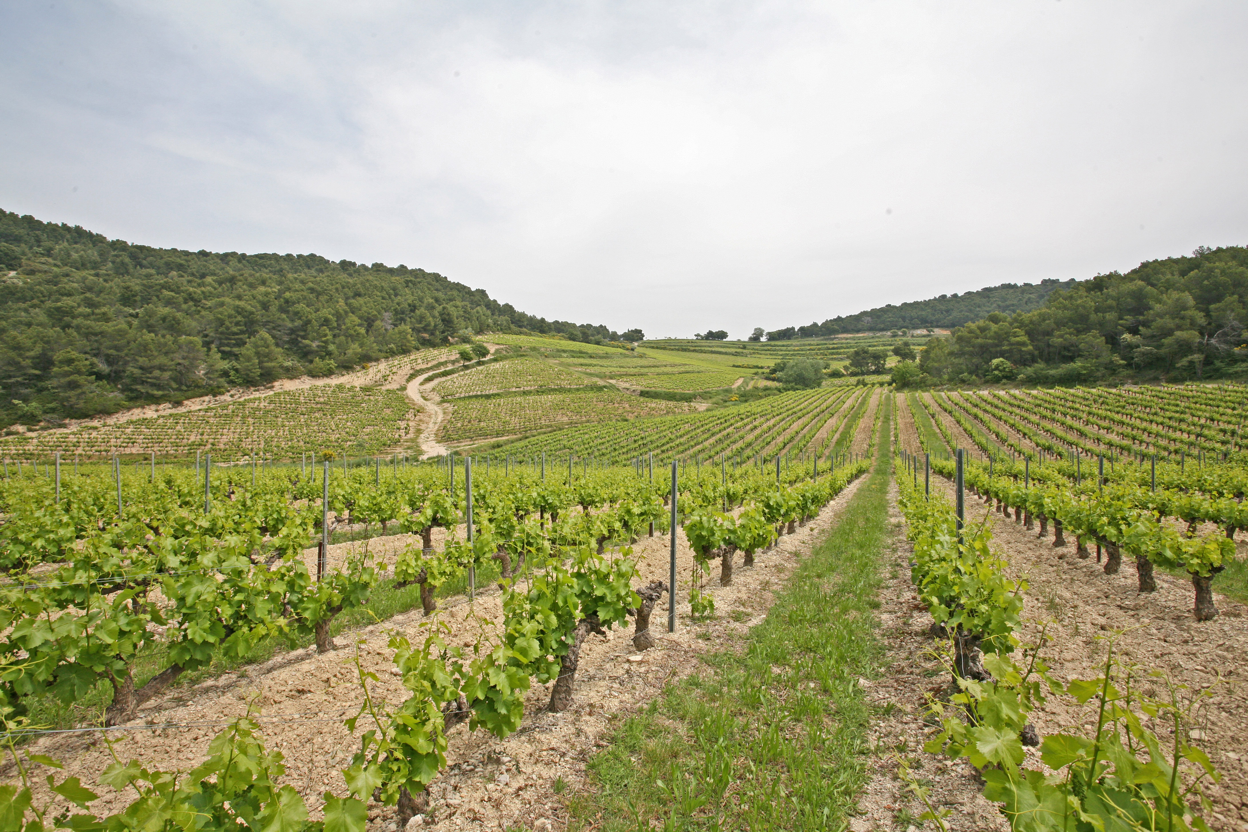 Vignes proches de La-Roque-Alric (Vaucluse)